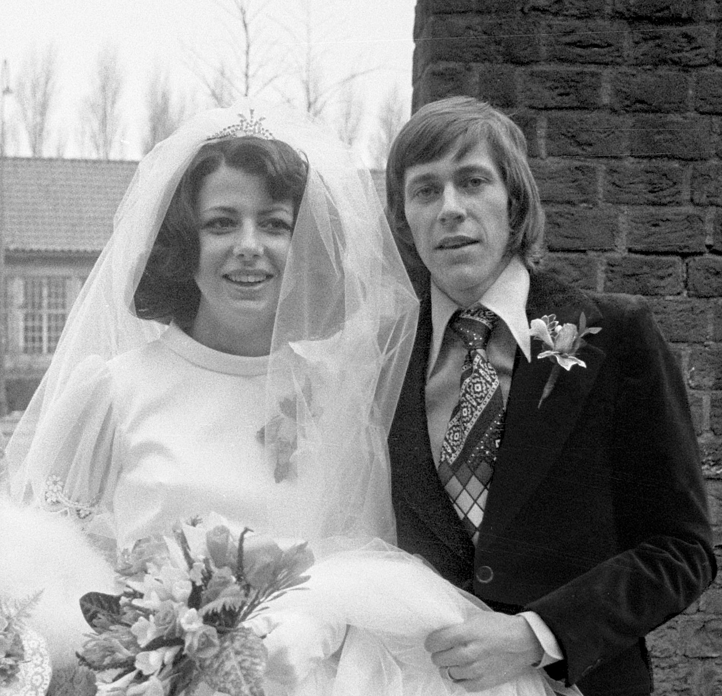 Huwelijk Ajaxspeler Arnold Mühren en Gerrie Kroon